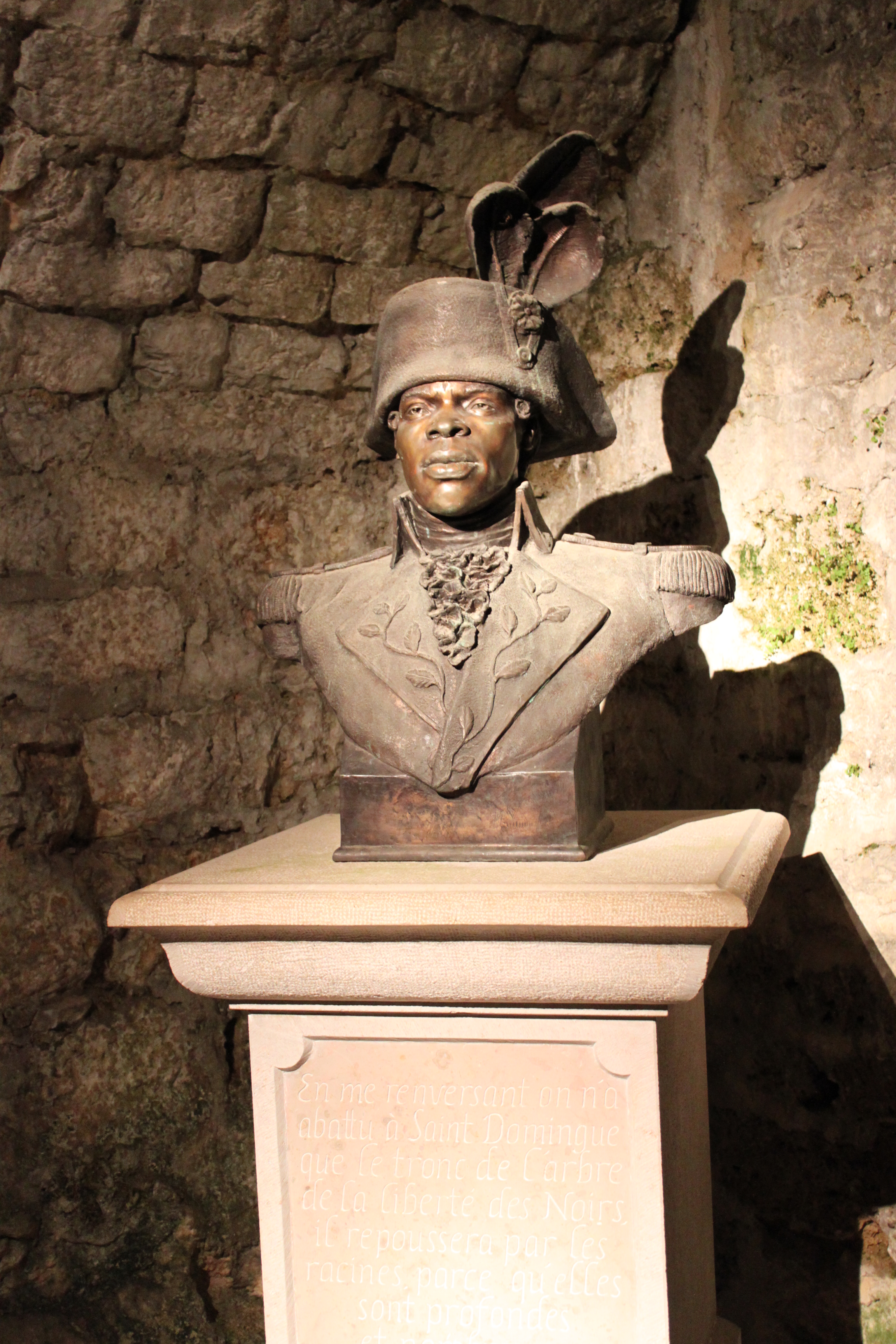 Fort de Joux, Doubs, Franche-Comté, France TEXTE DU SOCLE : En me renversant on n'a abattu à Saint Domingue que le tronc de l'arbre de la liberté des Noirs. Il repoussera par les racines parce qu'elles sont profondes et nombreuses. TOUSSAINT LOUVERTURE